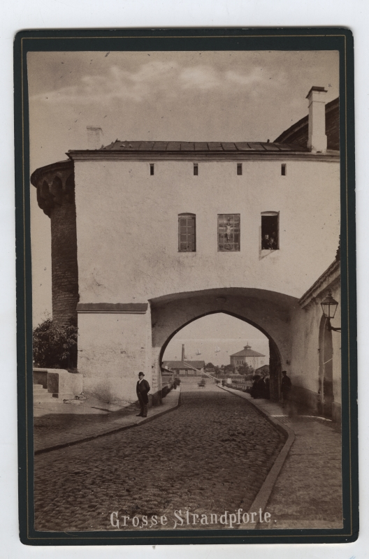 Suur Rannavärav linna poolt, vaadatuna Pikalt tänavalt. Suur Rannavärav ehitati 1518–1529.